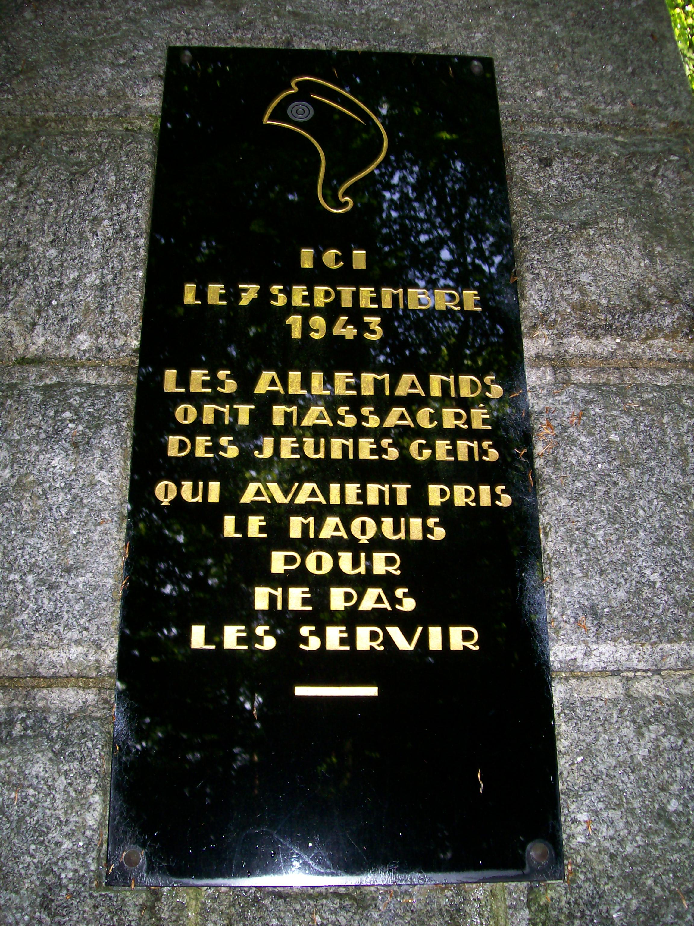 Plaque commémorative située au centre du monument.